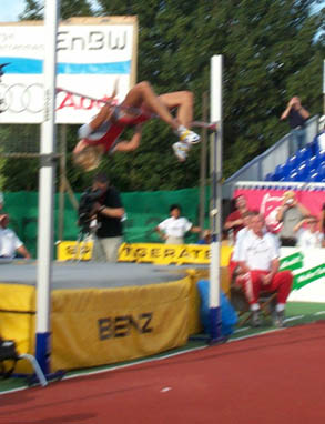 Kajsa Bergqvist bei ihrem 2,06-Sprung von Eberstadt 2003, selbst fotografiert und zur Nutzung freigegeben